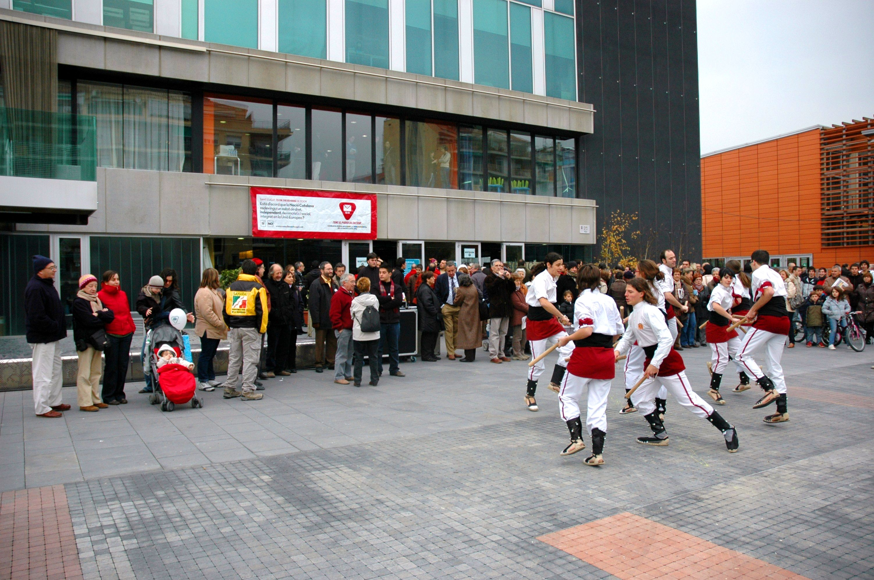 Sant Cugat - 13D